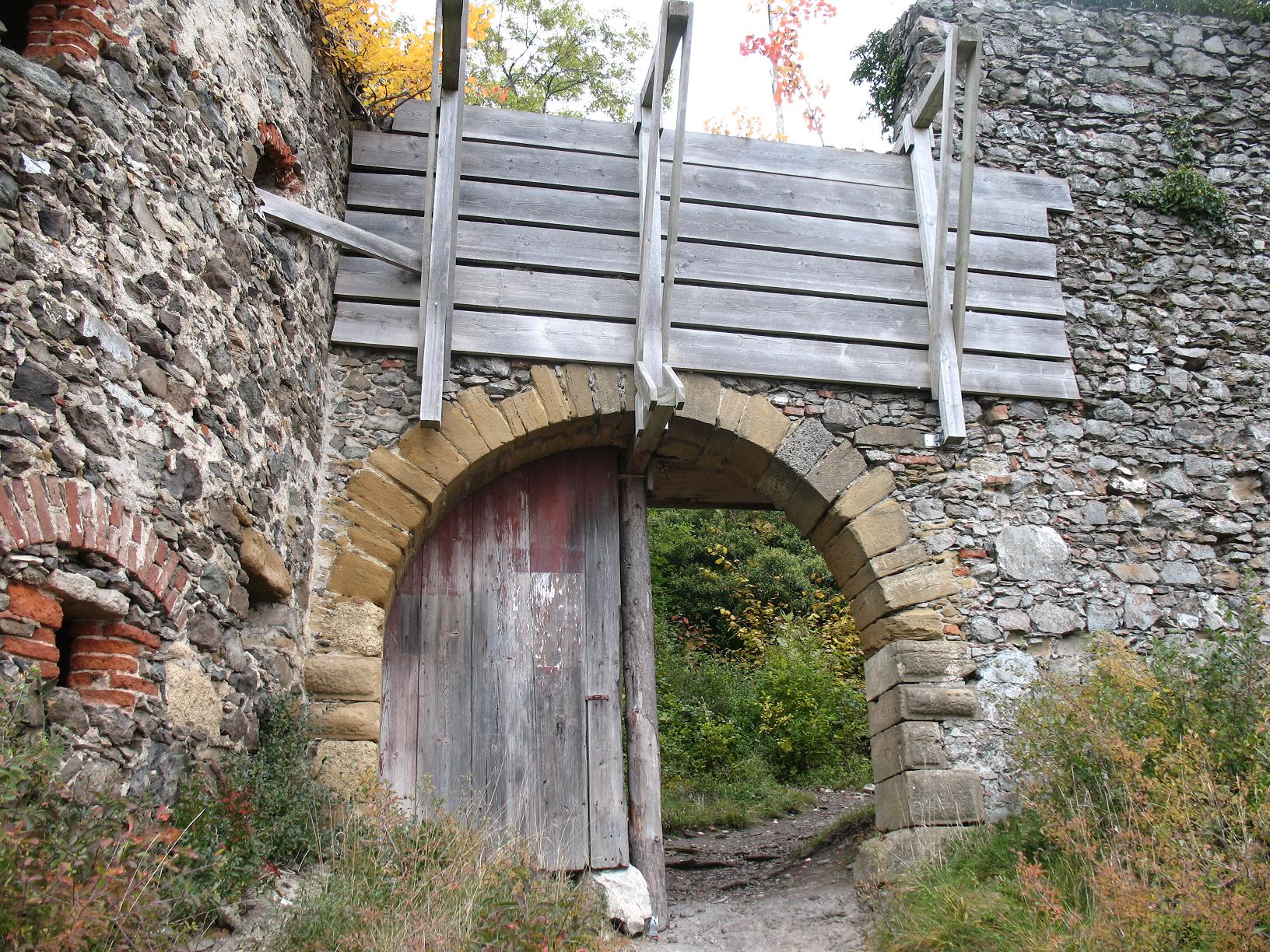 Eingangstor der Burg Mägdeberg